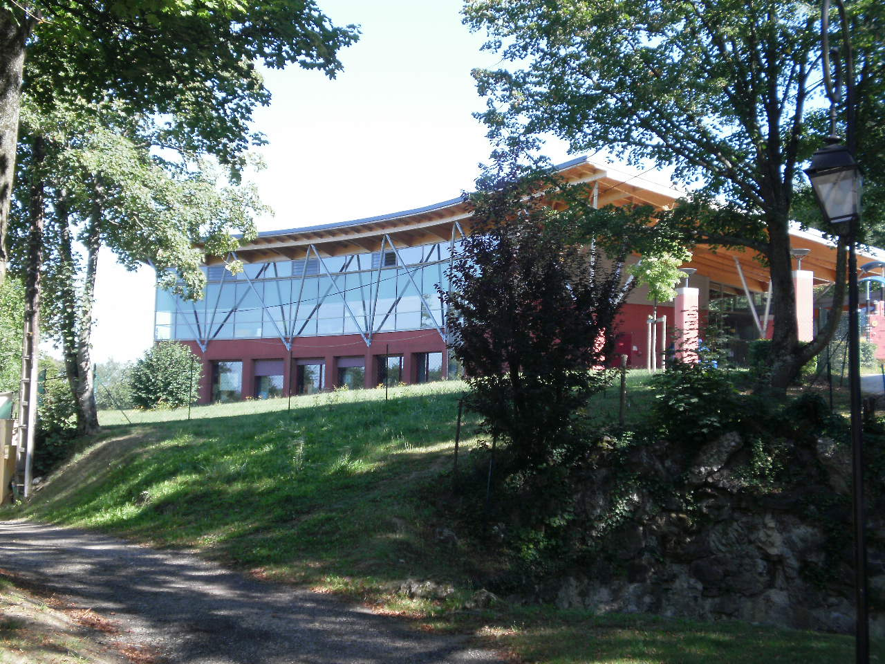 Ecole maternelle